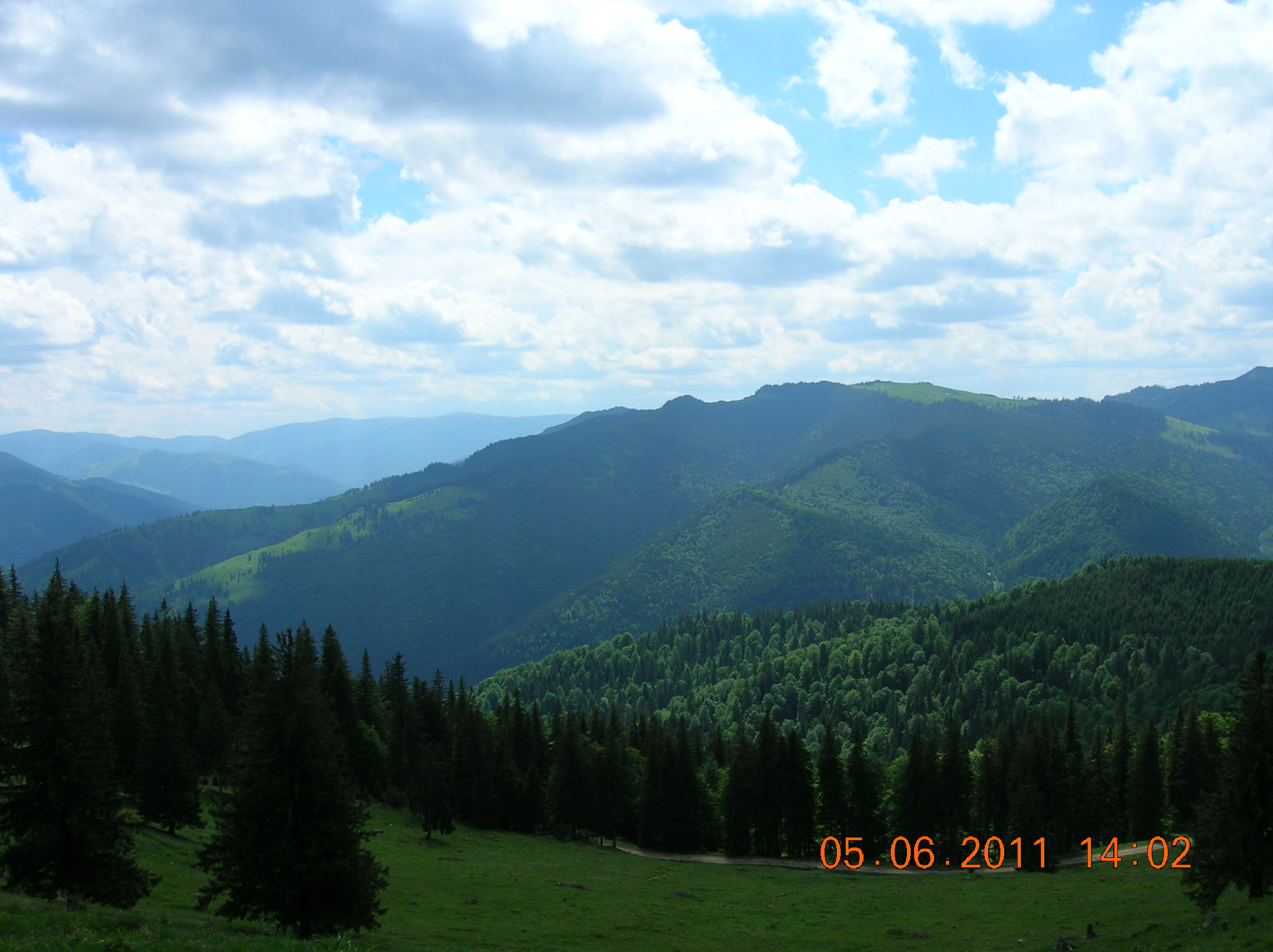 Munţii Stânişoarei (Carpaţii Orientali, România)-În faţă în ordinea planurilor: Drumul Talienilor - coborînd spre Borca, Valea Sabasei, Bîtca Comorii (cred, nu sunt sigur). În stînga imaginii - cam de la ora 9 oblic spre ora 1 - Valea Bistiţei şi în stînga sus Munţii Bistriţei